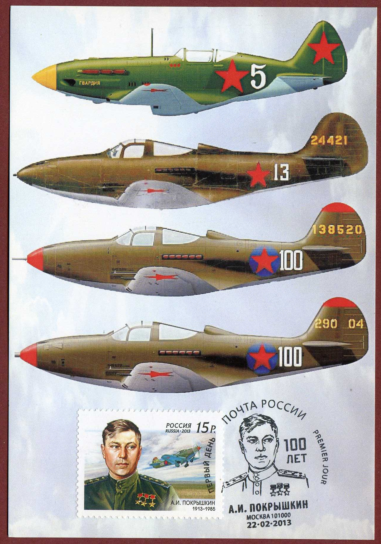 Картмаксимум